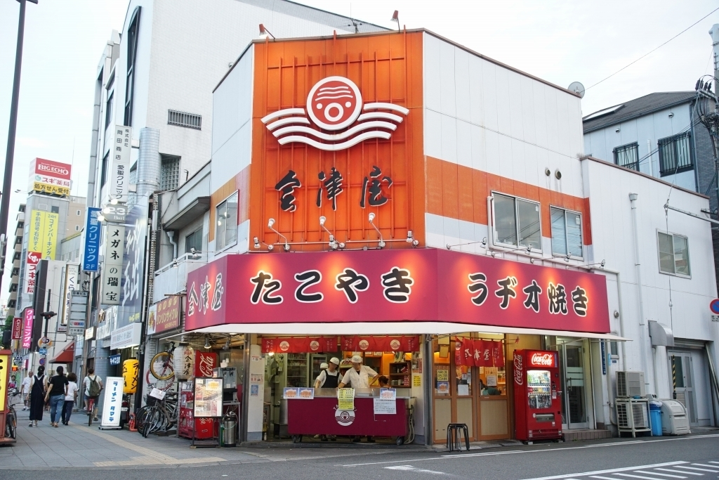 会津屋本店です